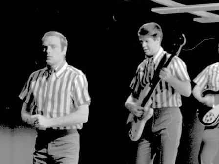 The Beach Boys